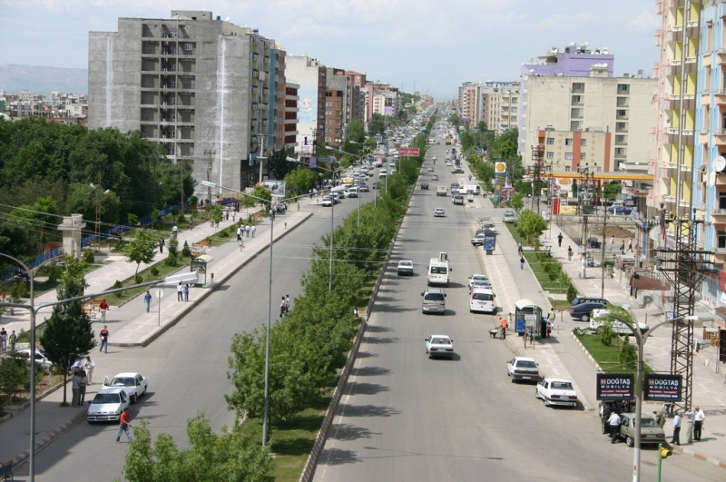 Batmandan Bir Görünüm